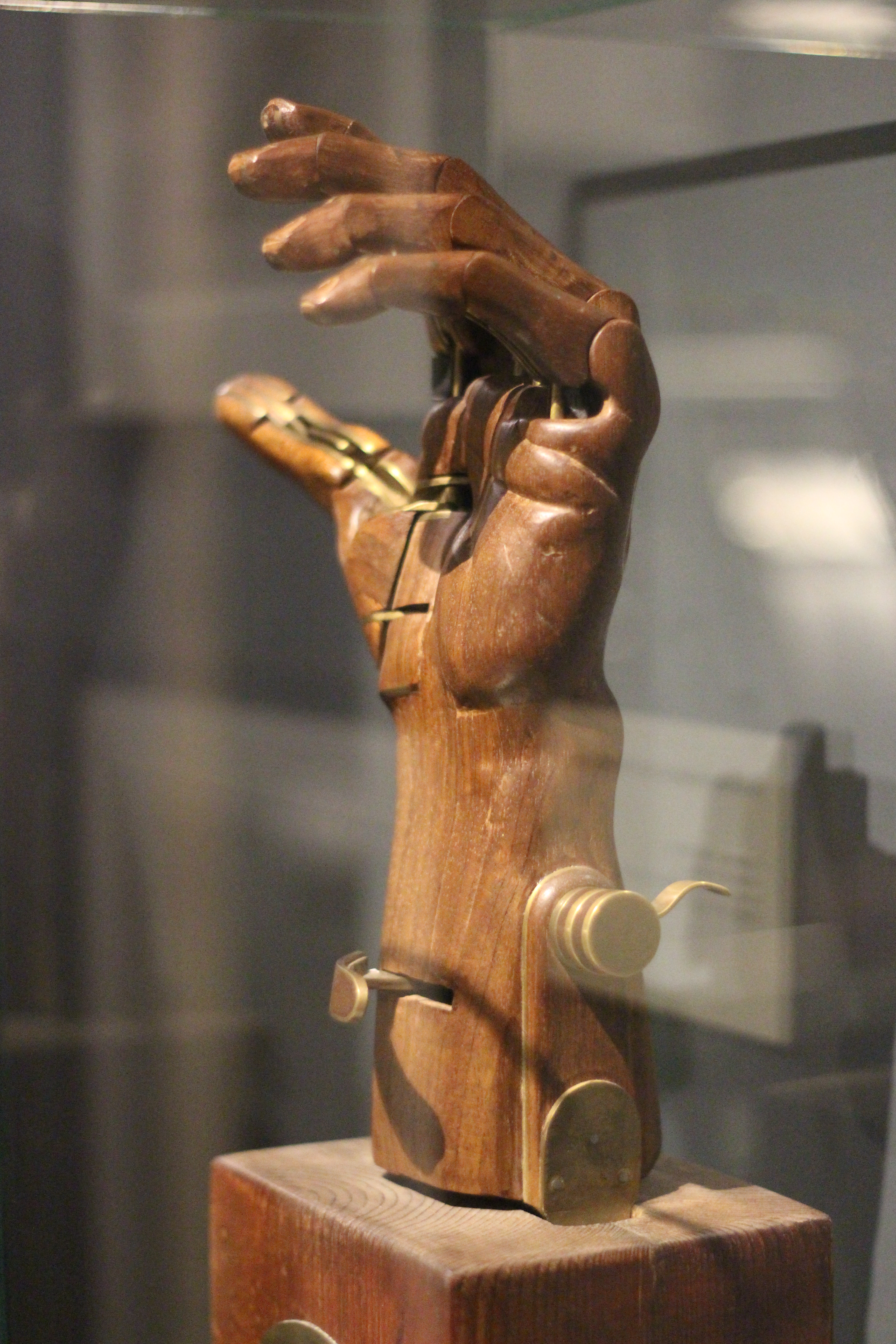 Prothèse de main utilisée dans le film Un long dimanche de fiançailles. Exposition "Caro/Jeunet" au musée Minature et Cinéma en 2018-2019.